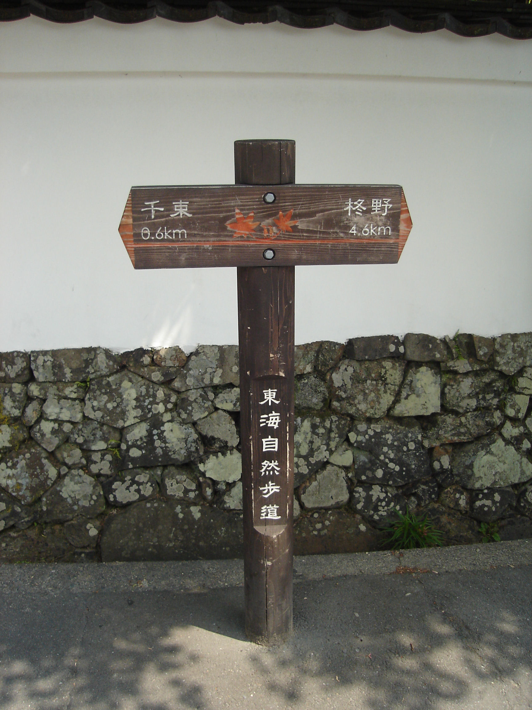 東海自然歩道の道標（京都市北区鷹峯）